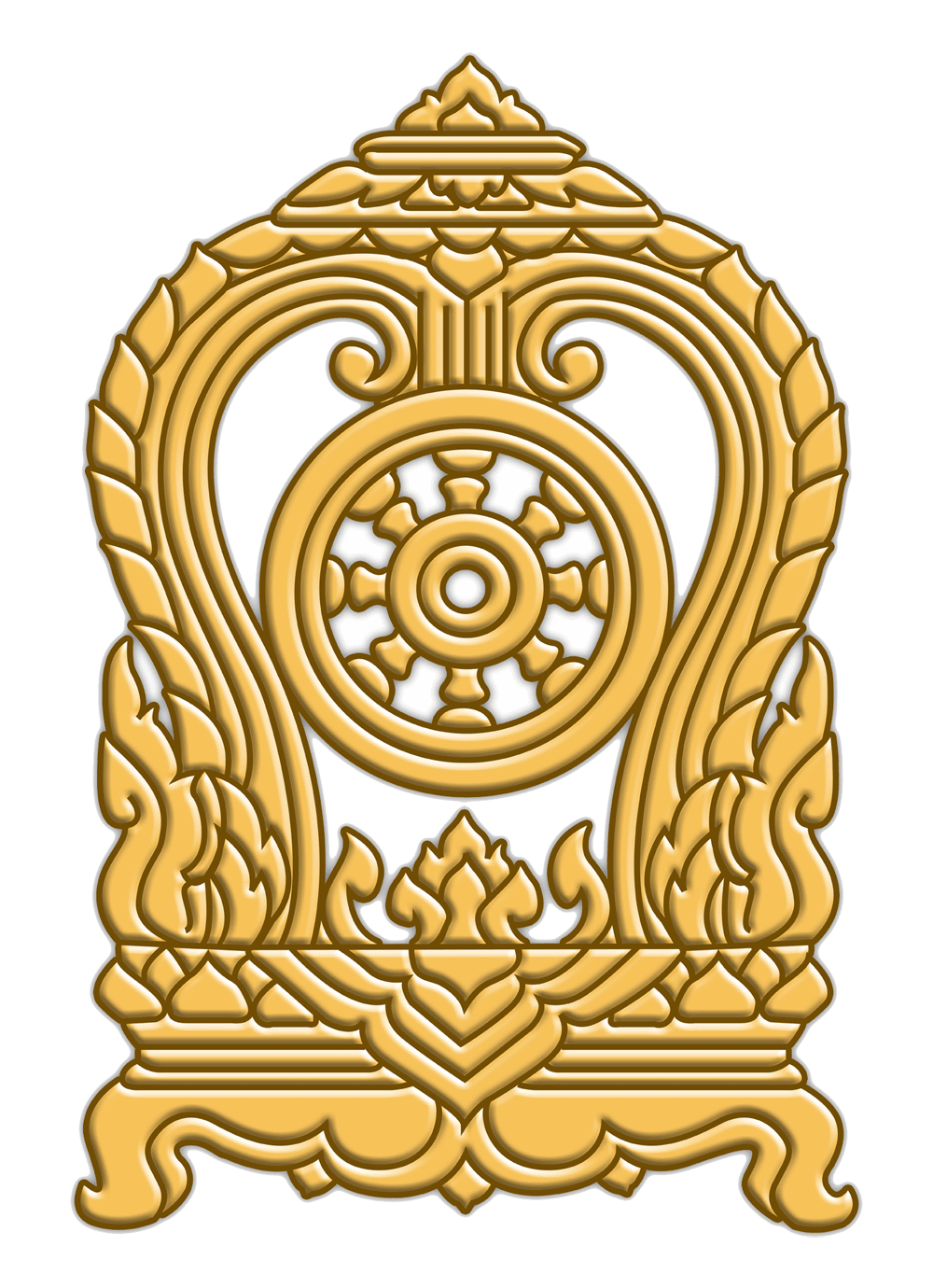 กระทรวงศึกษา